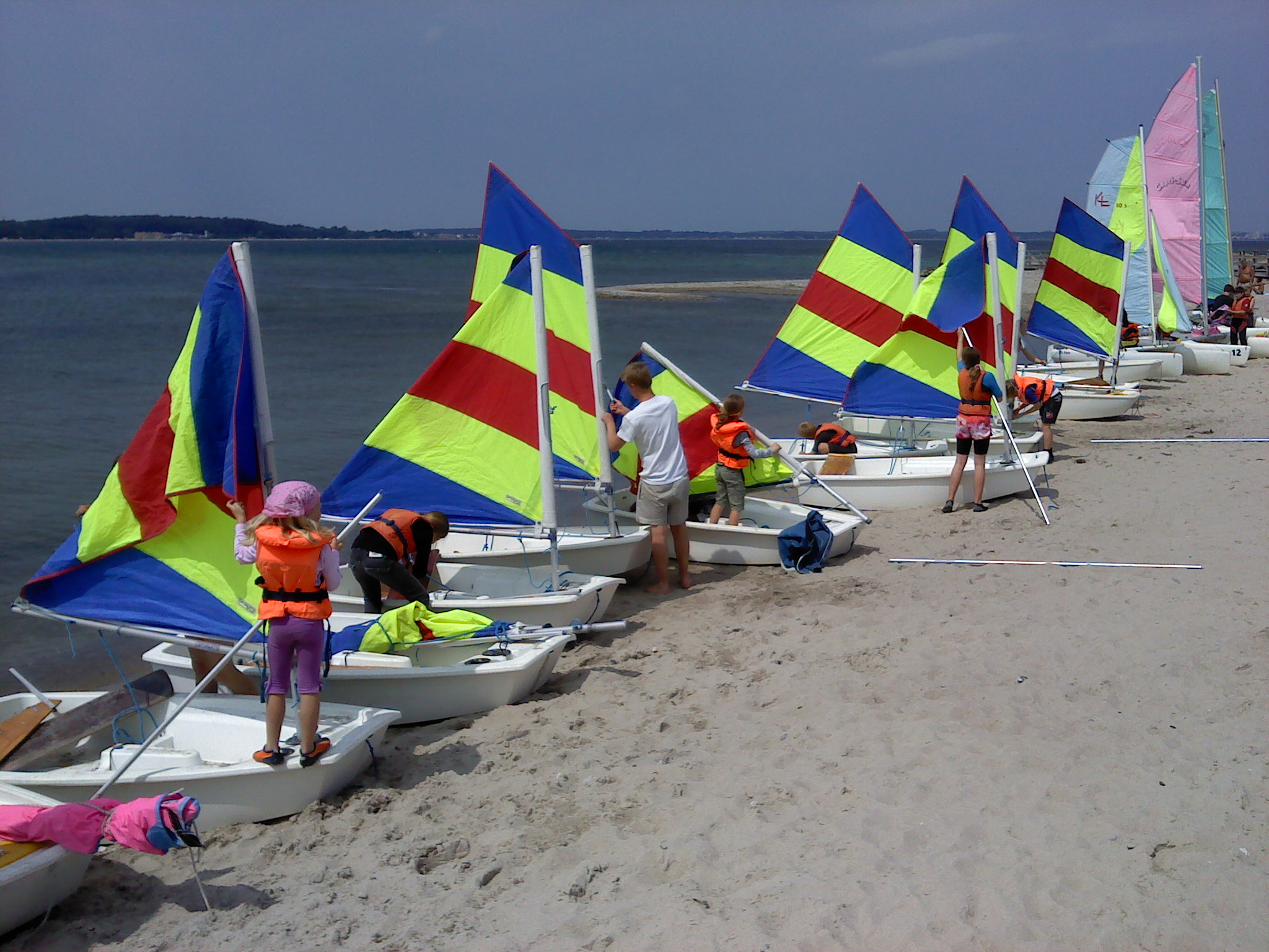 2011-06 Niendorf Jollenstation - Auftakeln der Optimisten